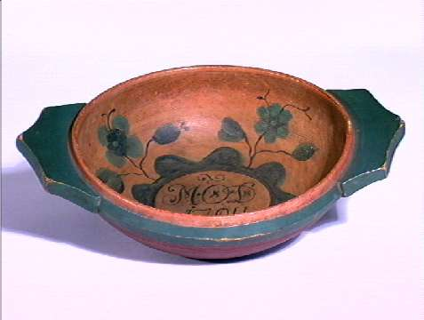 Vangar fra Øystre Slidre i Oppland. Nå på Norsk Folkemuseum i Oslo. NF.1897-1222